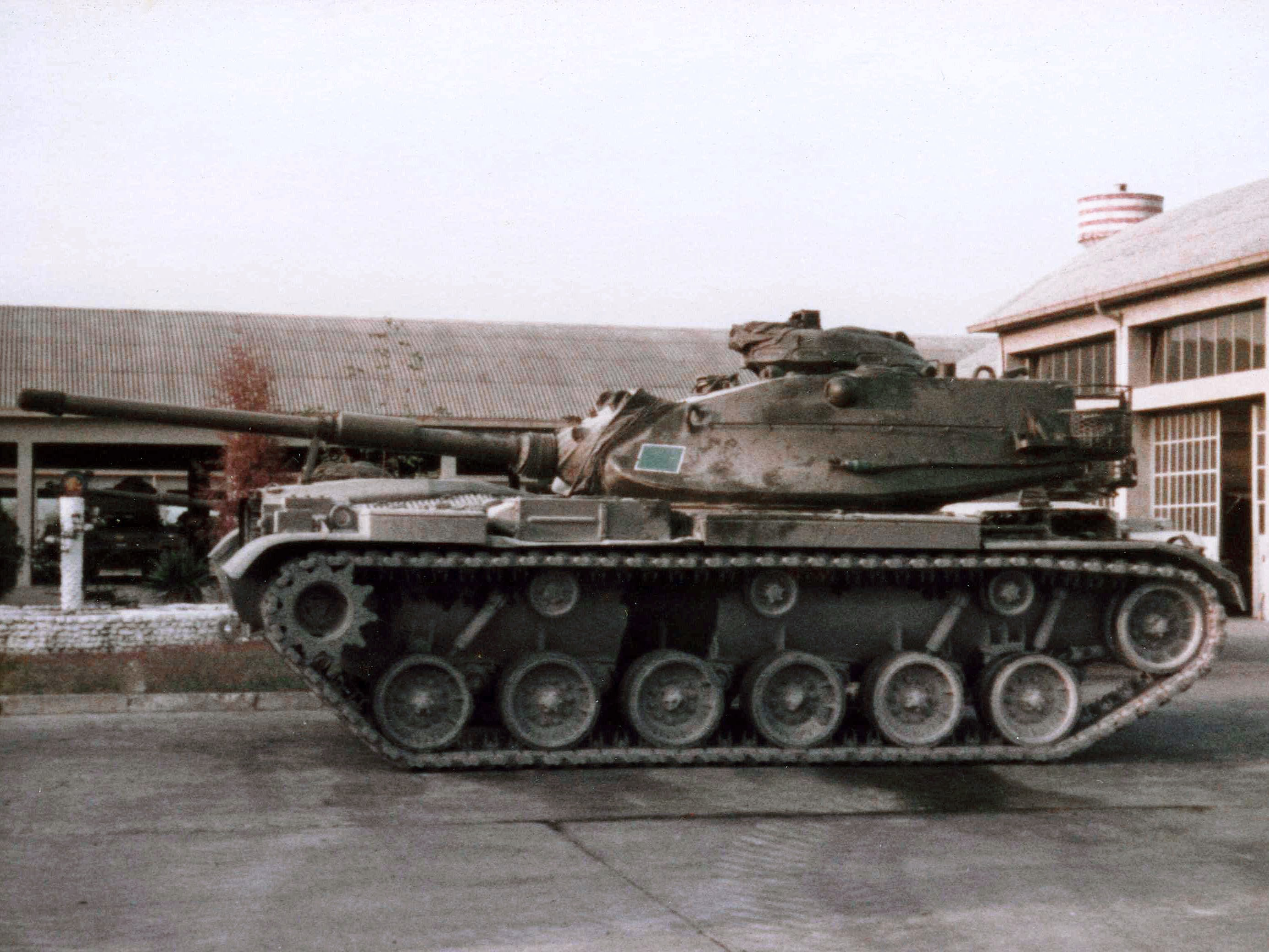 Carro armato M60 A1 in dotazione alla 132ª Brigata corazzata "Ariete" (Italia)